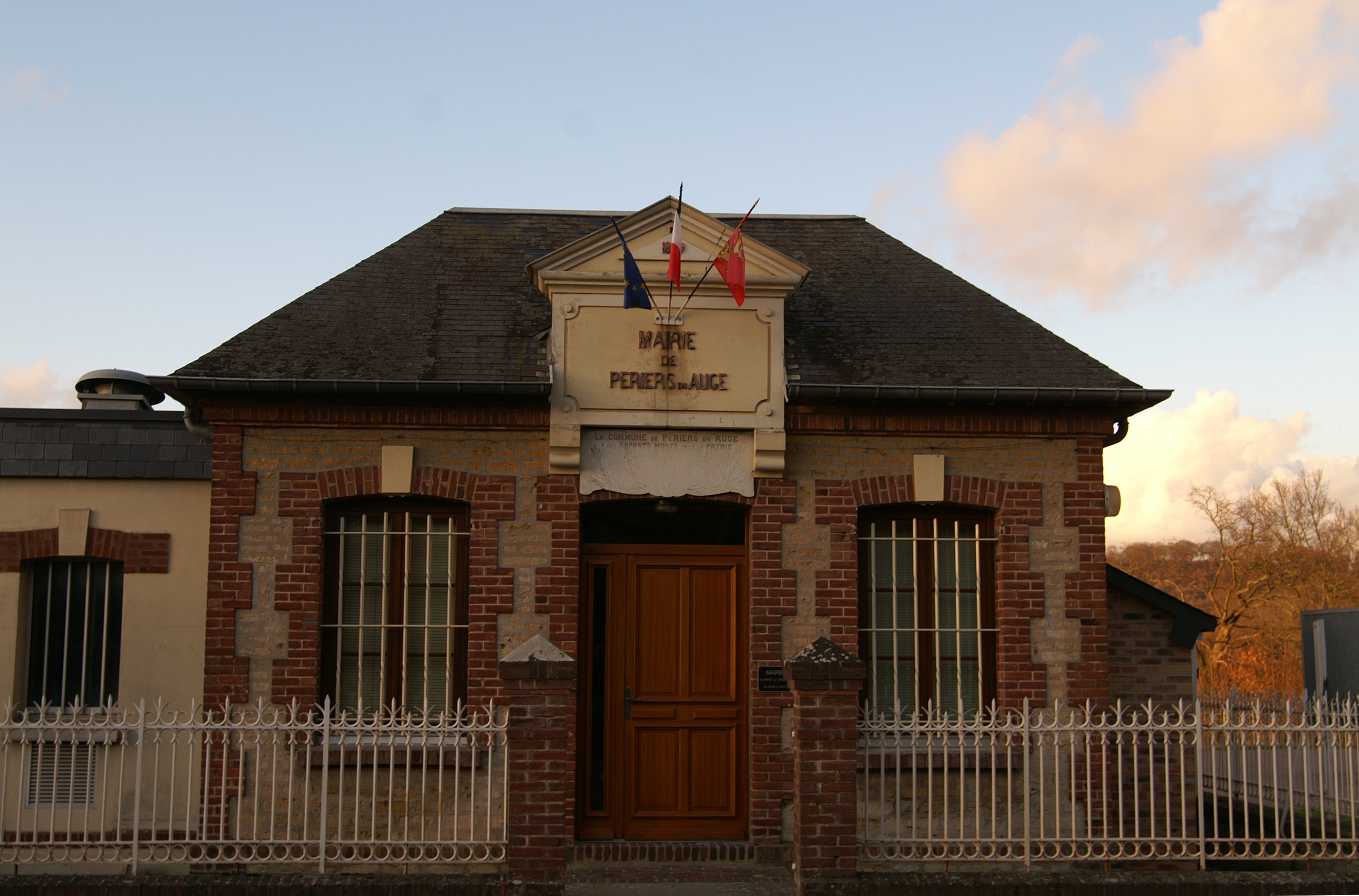 Mairie de Périers-en-Auge.